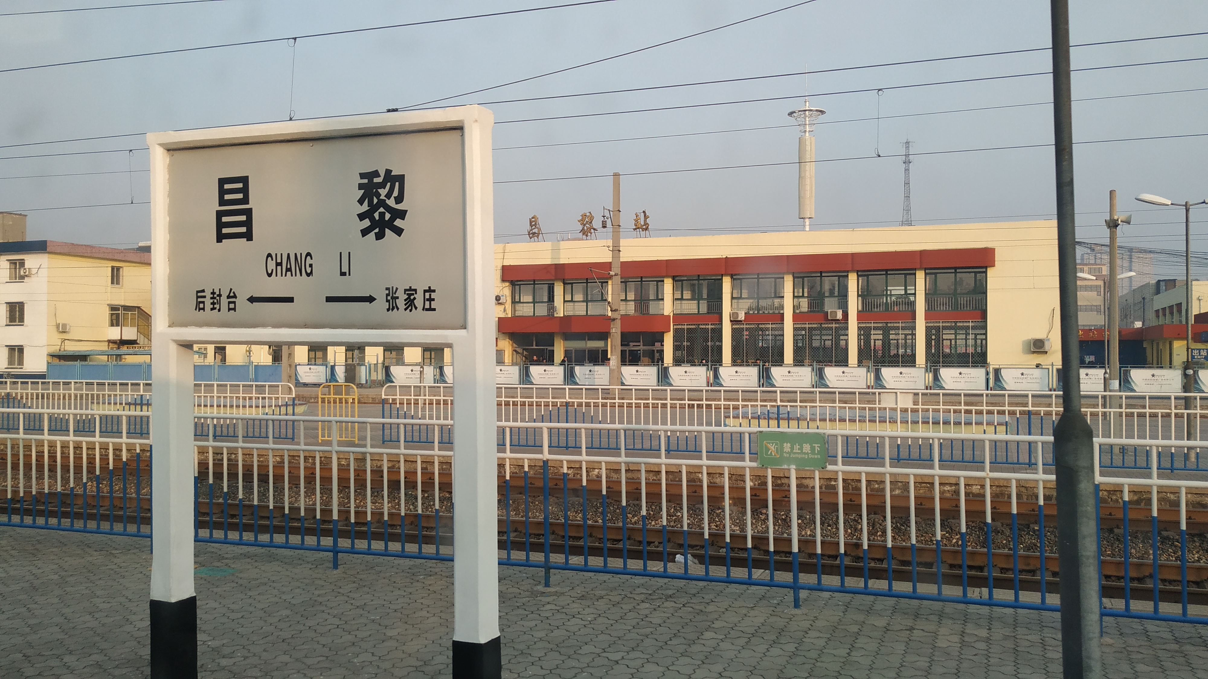 中文（中国大陆）: 河北昌黎火车站